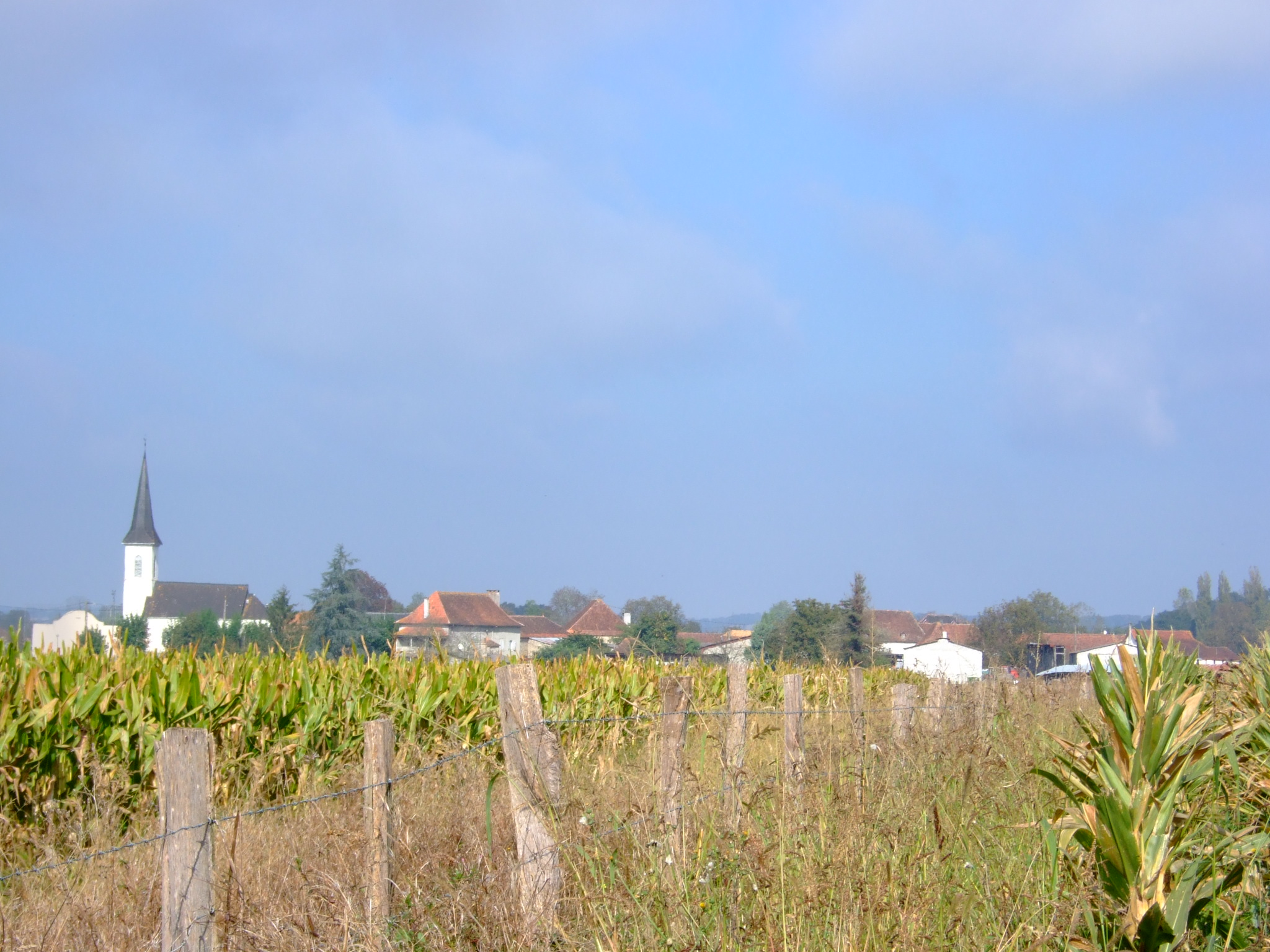 Vue du village de Charre depuis le sud